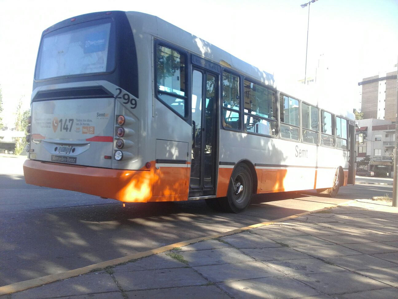 Interno 299 de la Línea 122